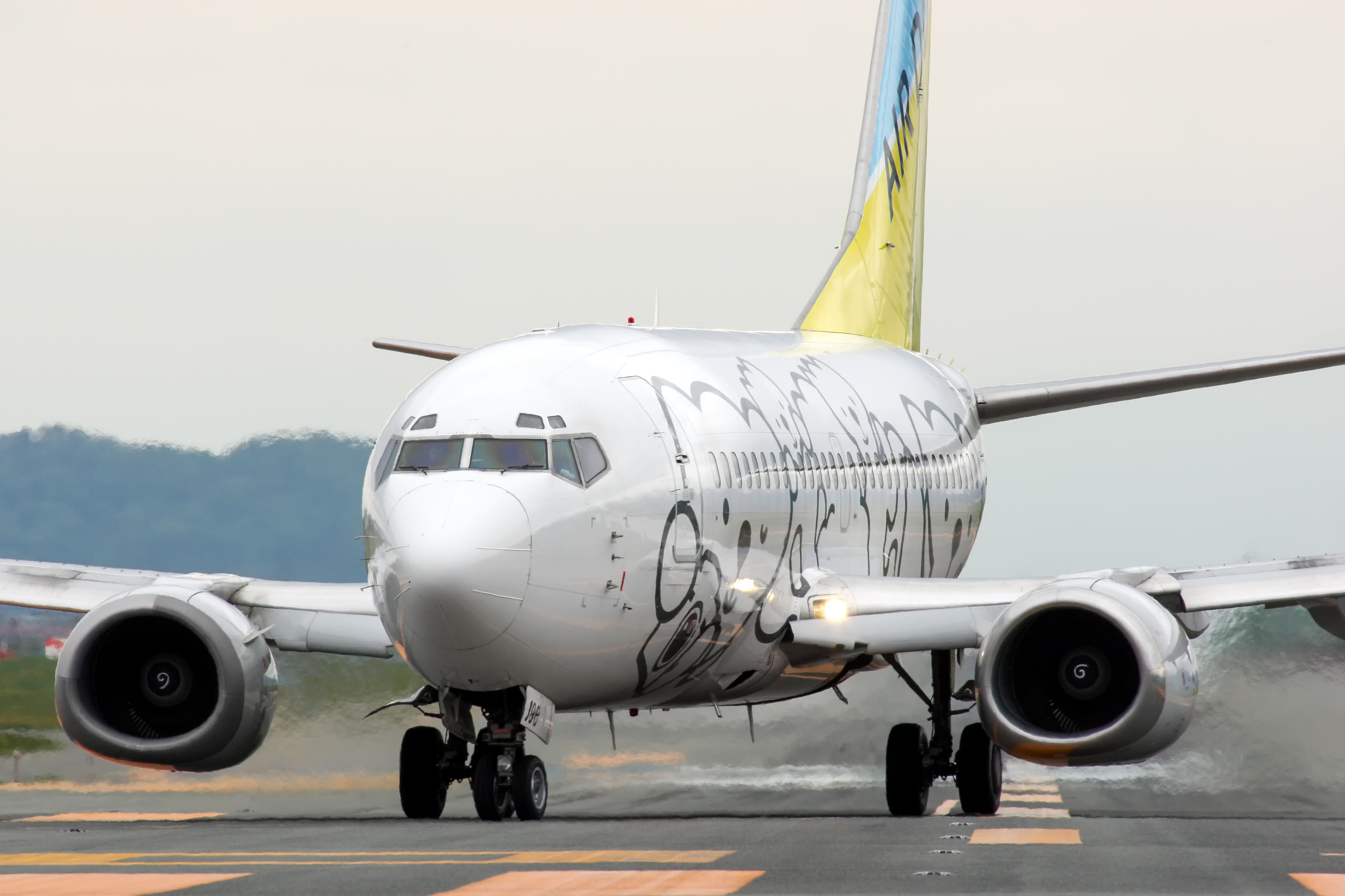 山形空港で撮影された、AIR DOのJA8196 Boeing 737-54K。 東日本大震災の影響で被災地支援の拠点となり、乗客が大幅に増加した山形空港への対応で、臨時便として就航した。